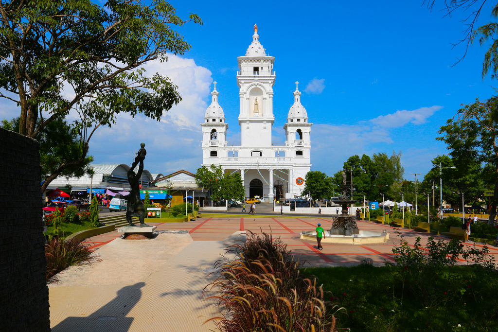 Plaza Jose Simeon Cañas con la historica Fuente de Neptuno, al fondo la bella Catedral Nuestra Señora de los Pobres.